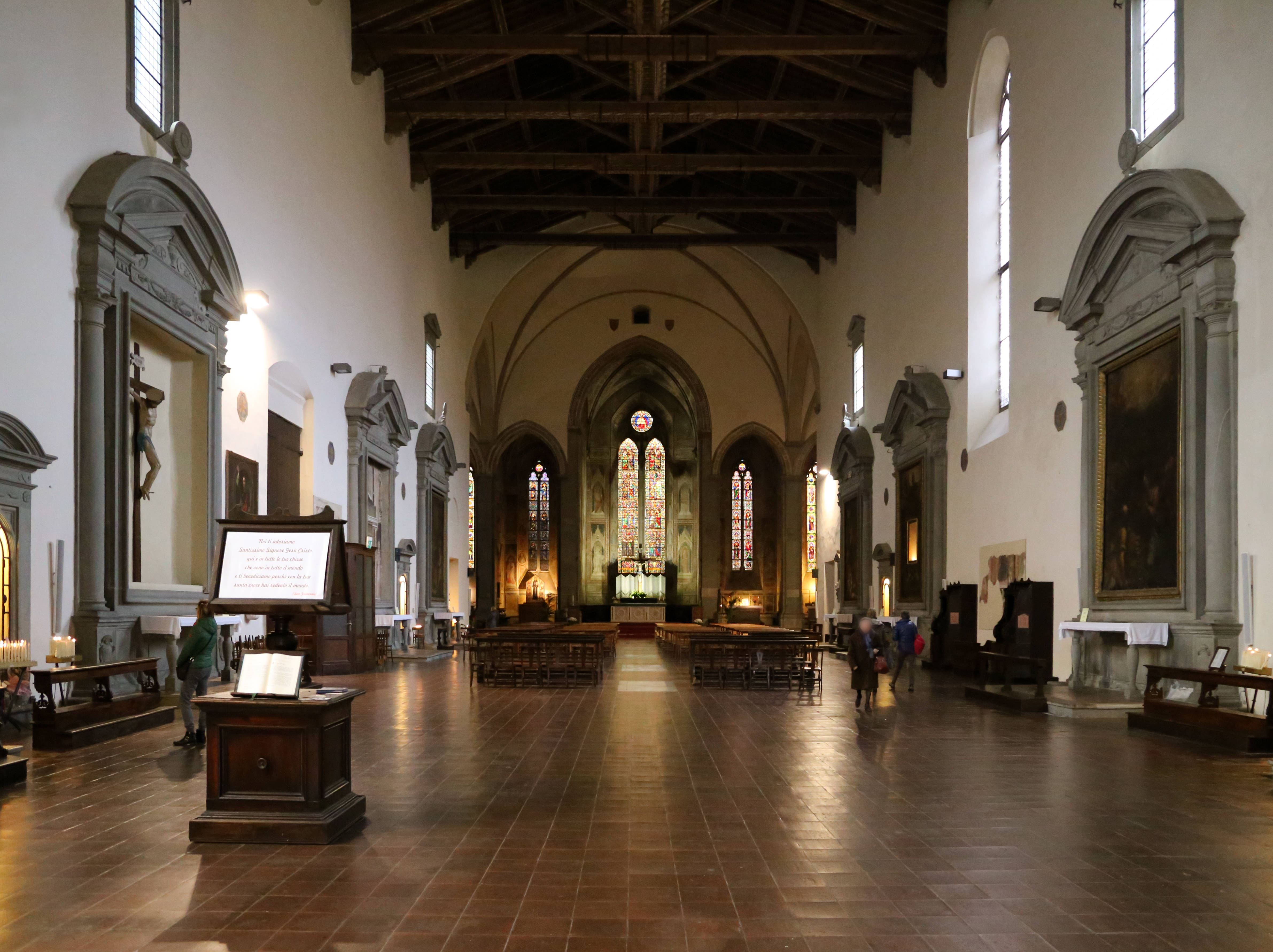 chiesa di San Francesco This is a photo of a monument which is part of cultural heritage of Italy.